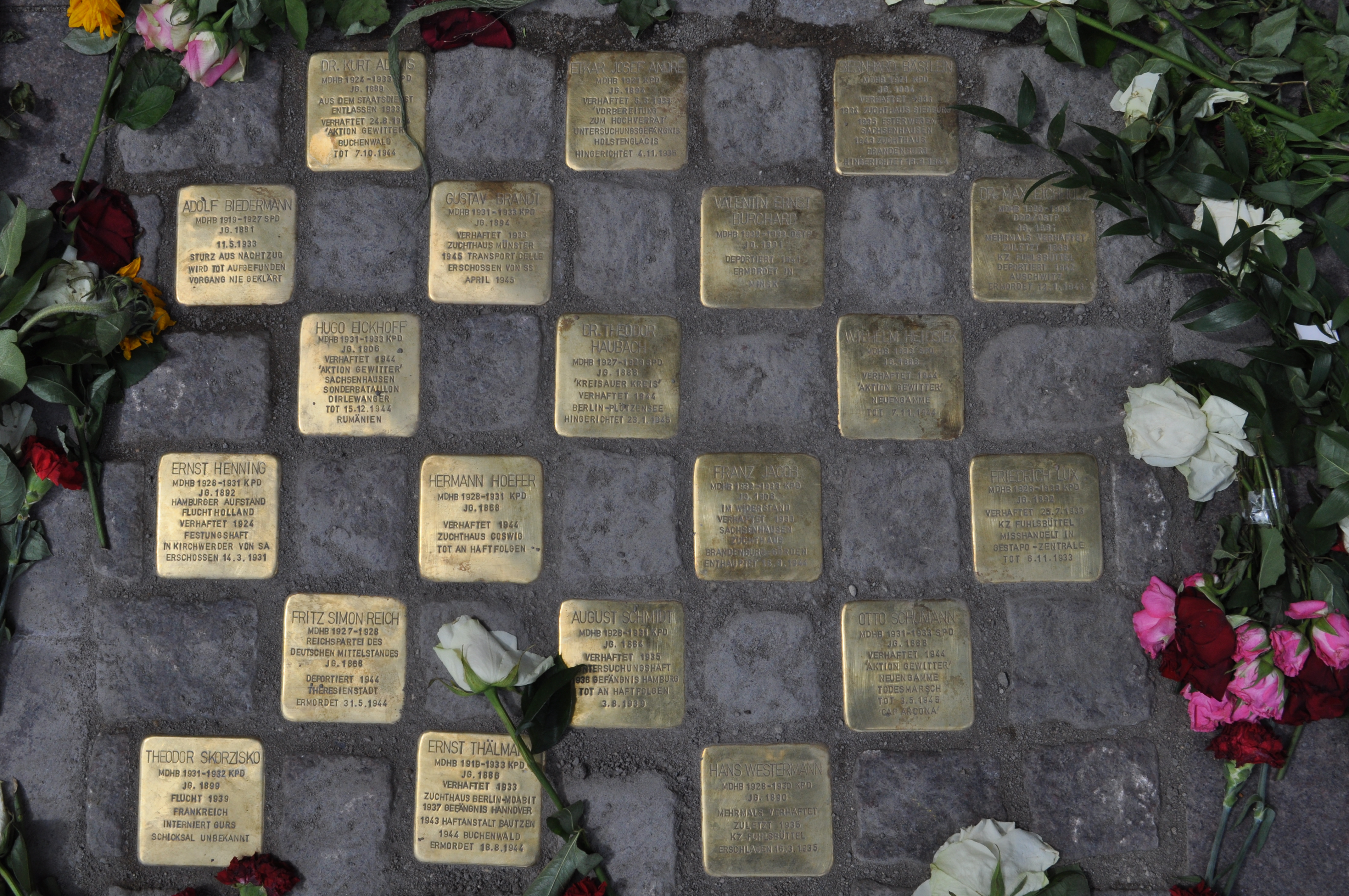 Links des Rathausportals eingelassene Stolpersteine für die ermordeten Mitglieder der Hamburgischen Bürgerschaft.